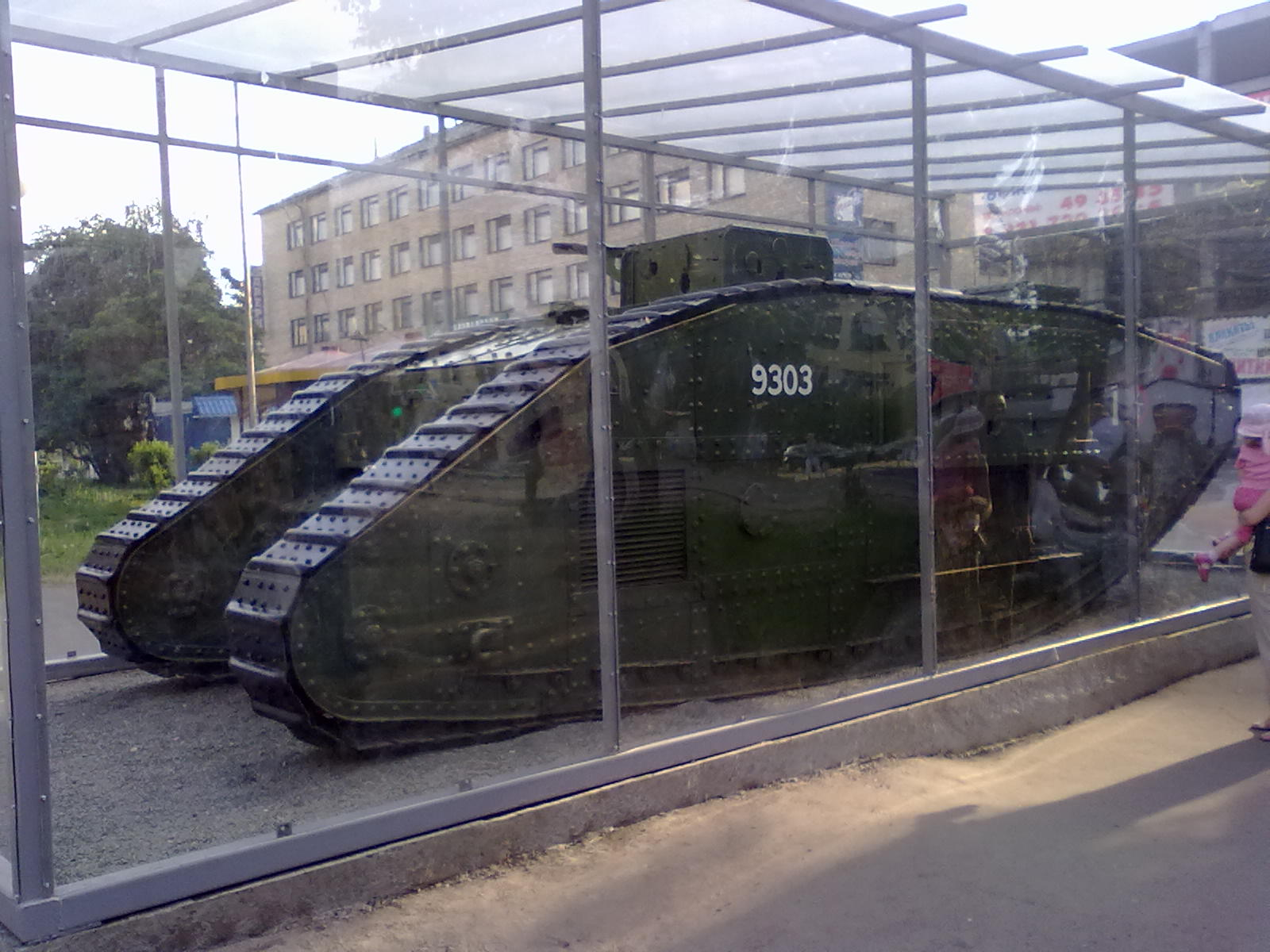 Танк Mk.V в Архангельске в стеклянном футляре после реставрации